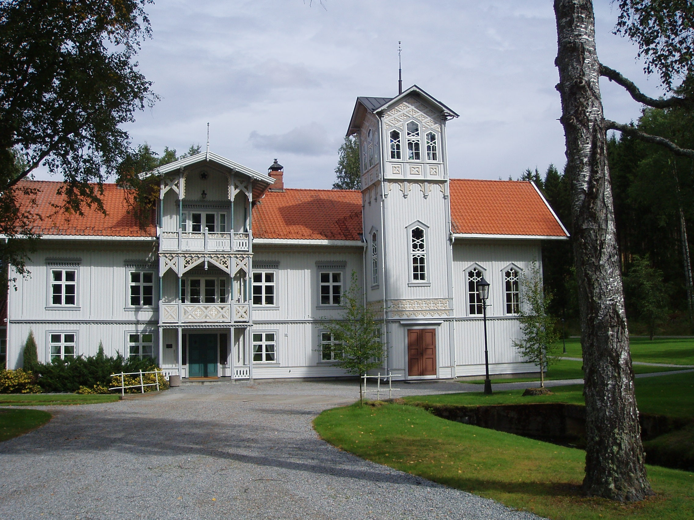 Hovedbygningen på Eidsverket, Bjørkelangen i Aurskog-Høland kommune.